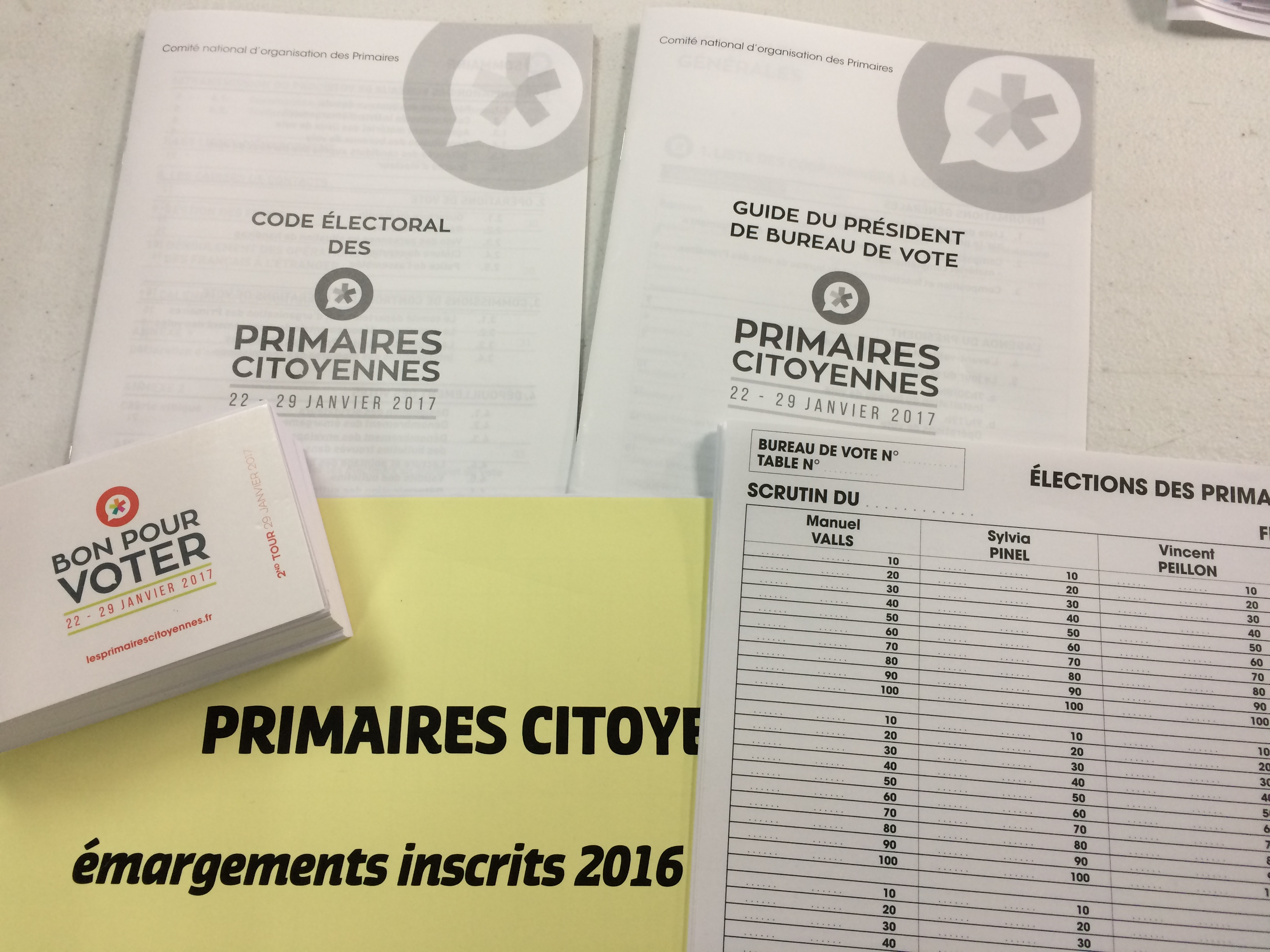 Elément du kit du bureau de vote des primaires citoyennes de 2017